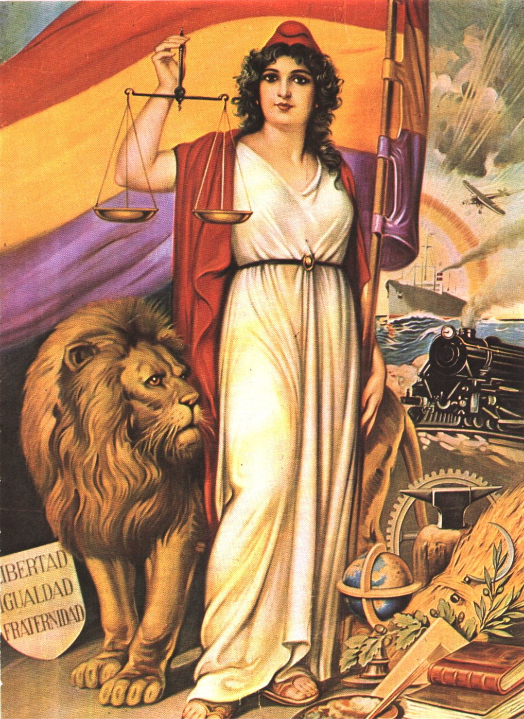 Allégorie de la République dans une lithographie de S. Dura d'après un dessin J. Barrera (Archive National Historique, Section Guerre Civil, Salamanque (Espagne)